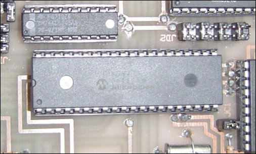 Mikropengawal PIC 16F877 oleh Microchip. Kamera sendiri.